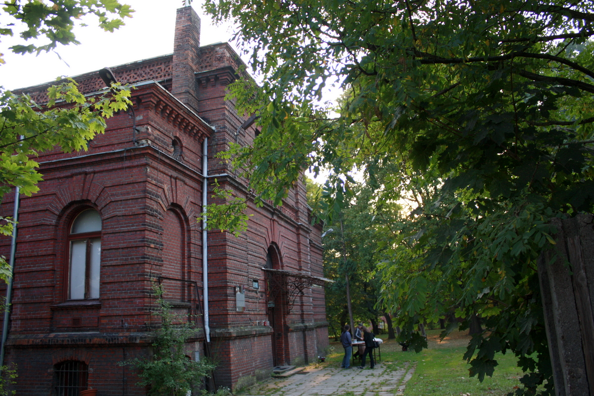 Łódź ul. Tymienieckiego 22/24 - rezydencja Henryka Grohmana